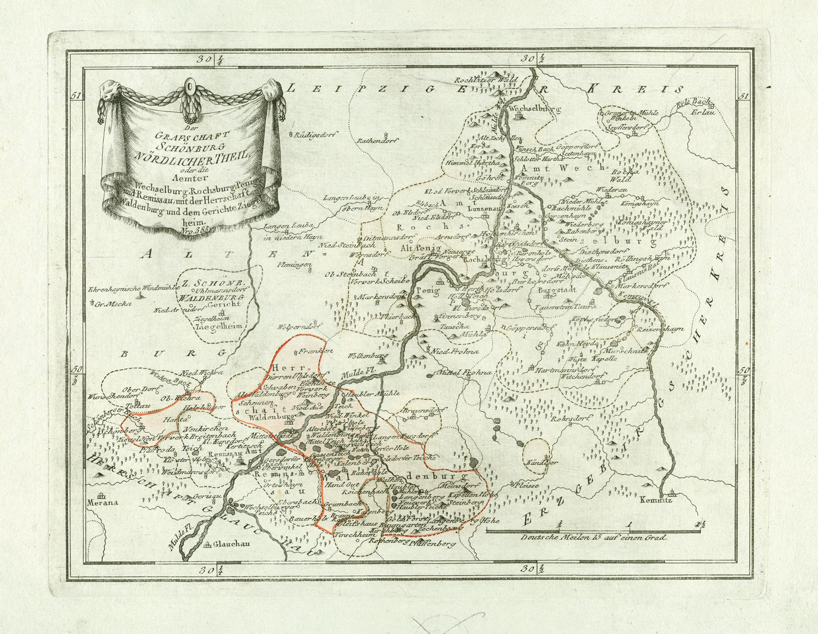 Der Grafschaft Schönburg Nördlicher Theil oder die Aemter Wechselburg, Rochsburg, Penig, und Remissau, mit der Herrschaft Waldenburg und dem Gerichte Ziegelheim. Nro. 383. Kupferstich, 27 × 20 cm